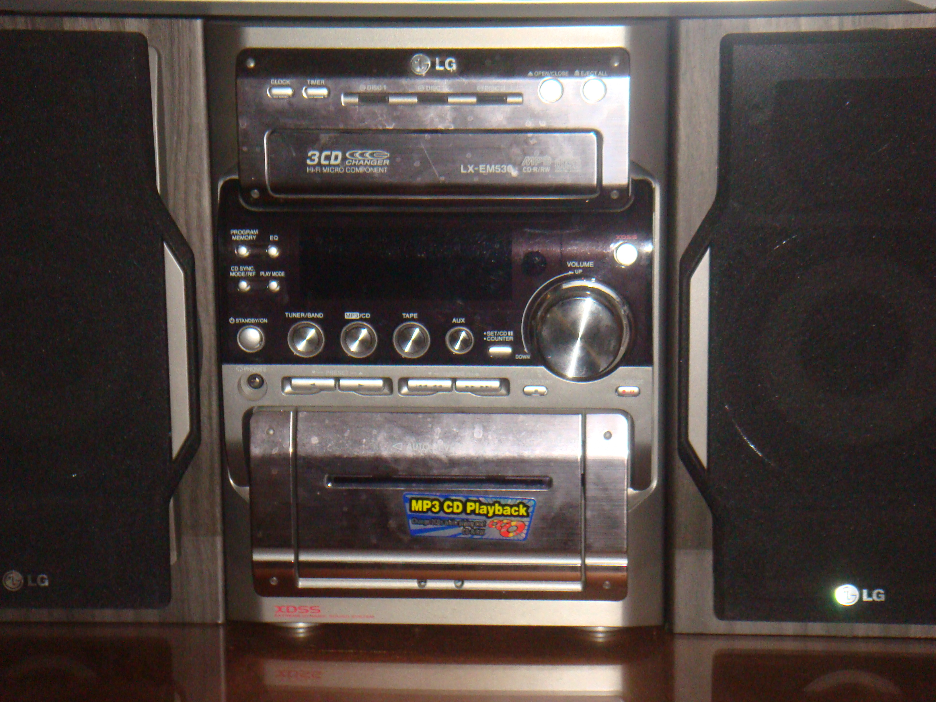 LG Estereo LX-EM530.